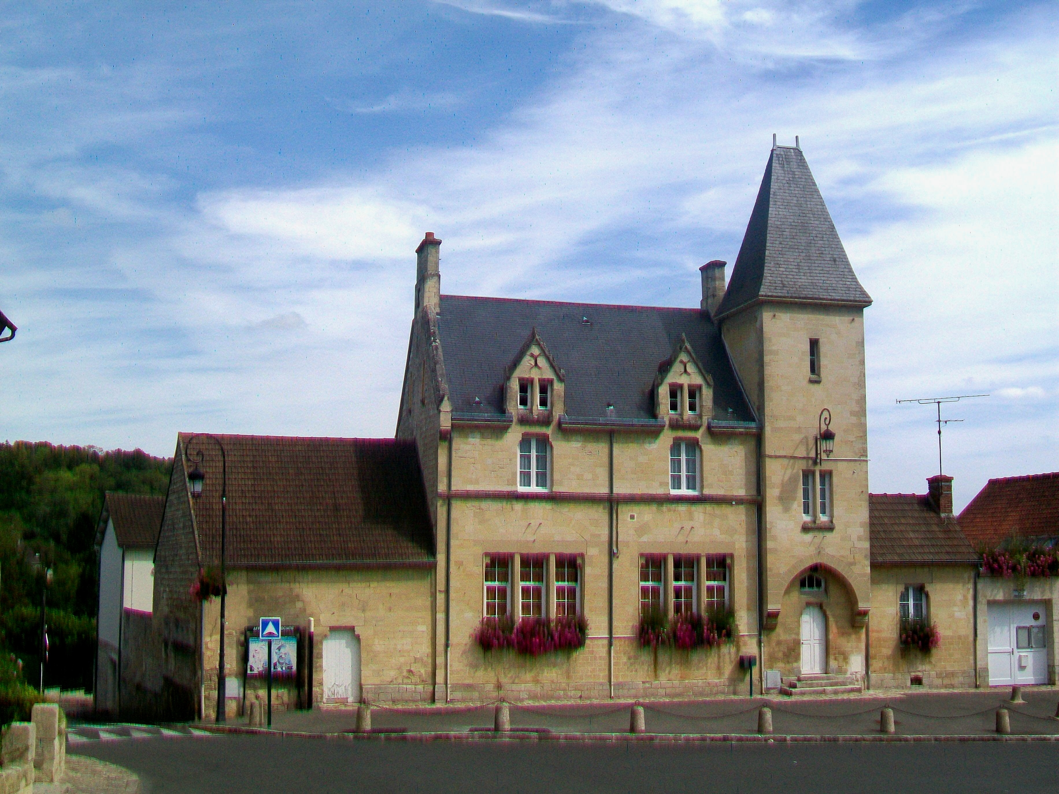 L'ancien presbytère et ancienne mairie de Jouy-le-Comte, rue du maréchal Joffre.